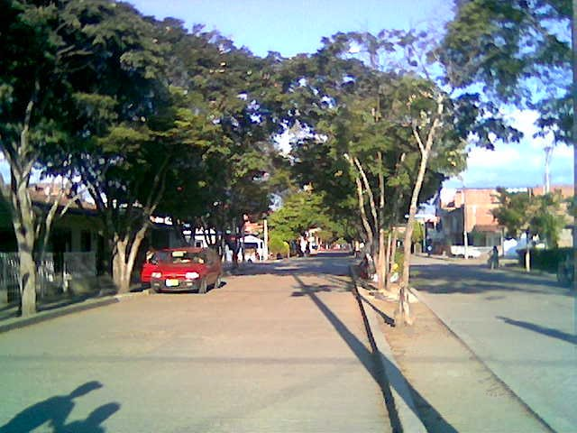 Avenida principal de Candelaria